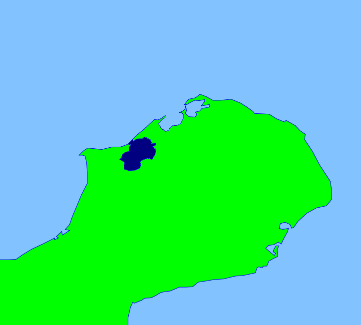 Mapa de la Baiha Portete, peninsula de Guajira, Colombia